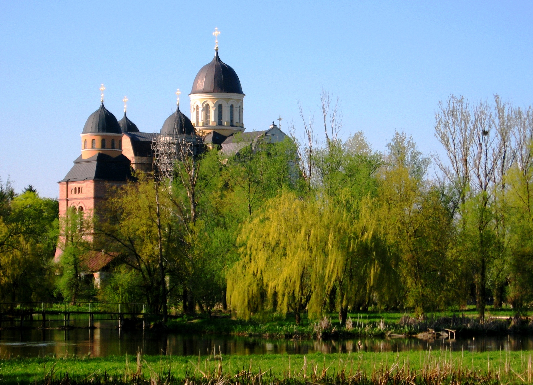 Берестечко. Свято-Троїцький собор